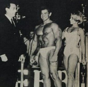 Publicité pour la méthode de bodybuilding de Joe Weider en couverture du magazine de catch Inside Wrestling de mars 1972, avec Larry Scott, Dave Drapper et Reg Lewis